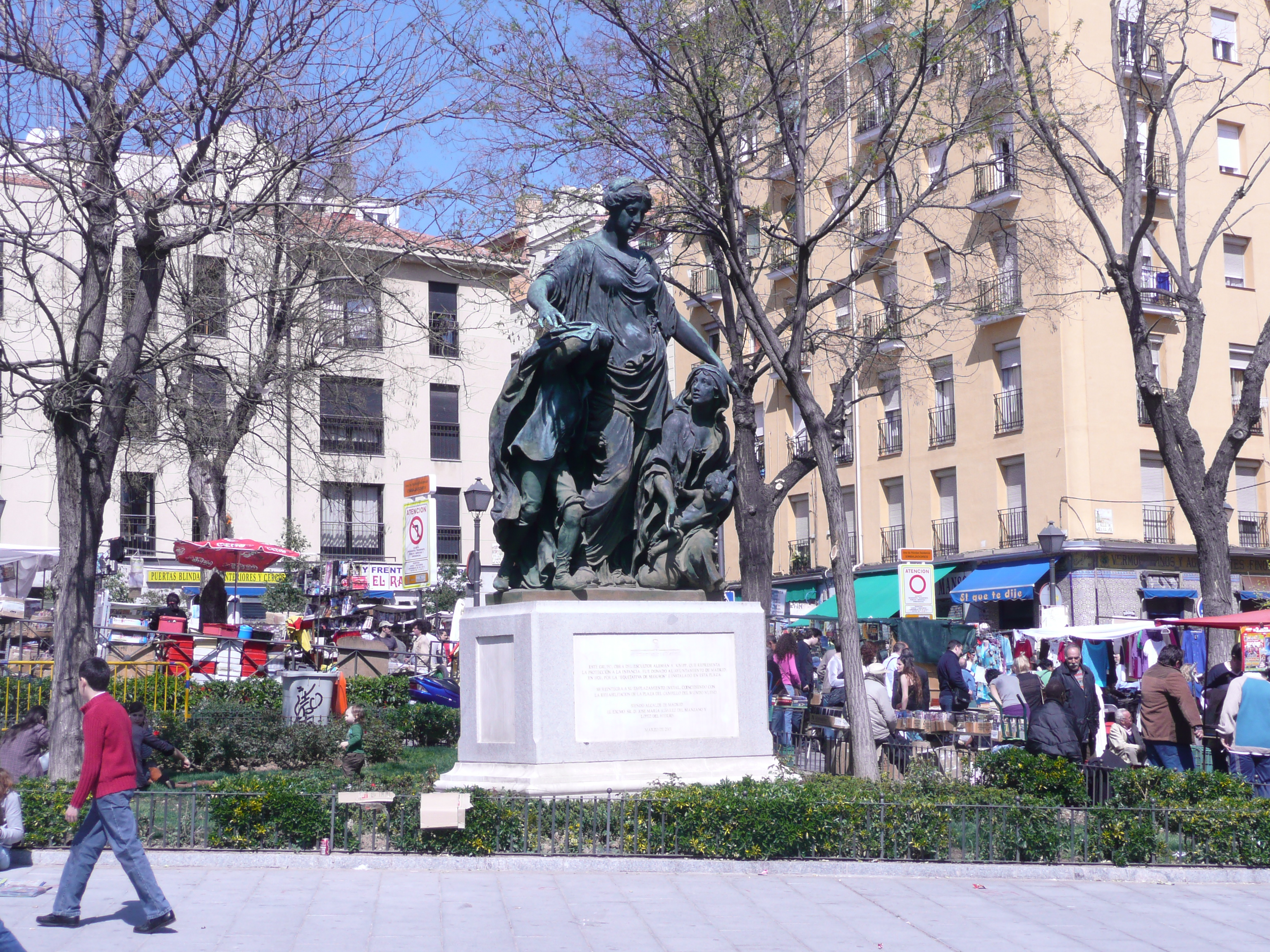 Estatua La protección de la orfandad y la viudez, en la plaza del Campillo del Mundo Nuevo (Rastro de Madrid). Obra de Viktor Tilgner, estuvo anteriormente en el edificio de la Equitativa de Madrid.